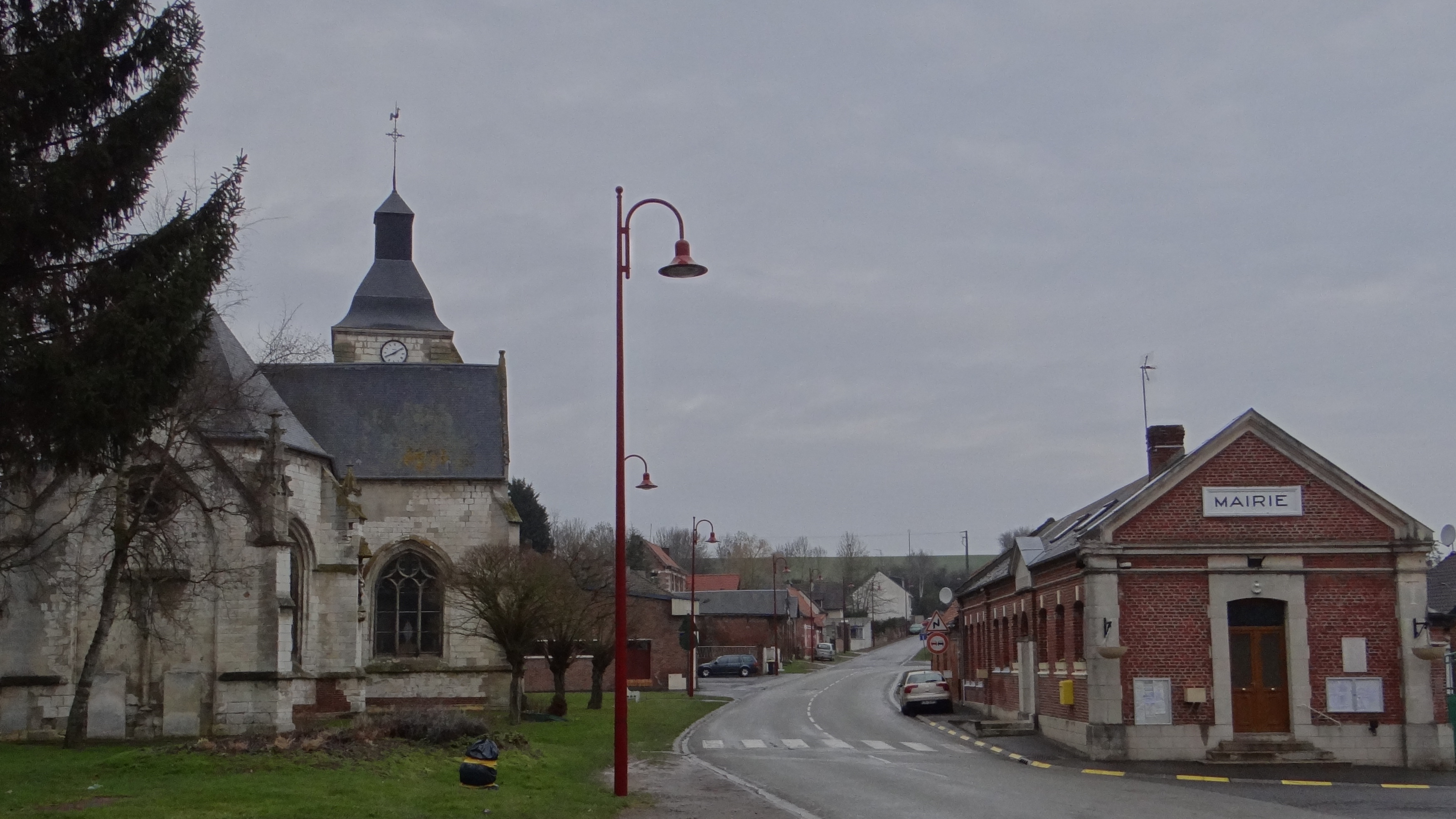 Morcourt Mairie et Eglise